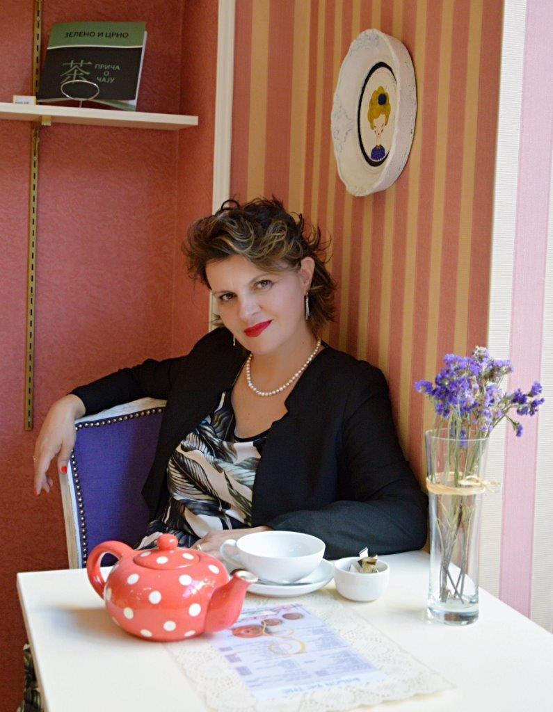 Maja Rogan, publicista, pisac i turistički vodič